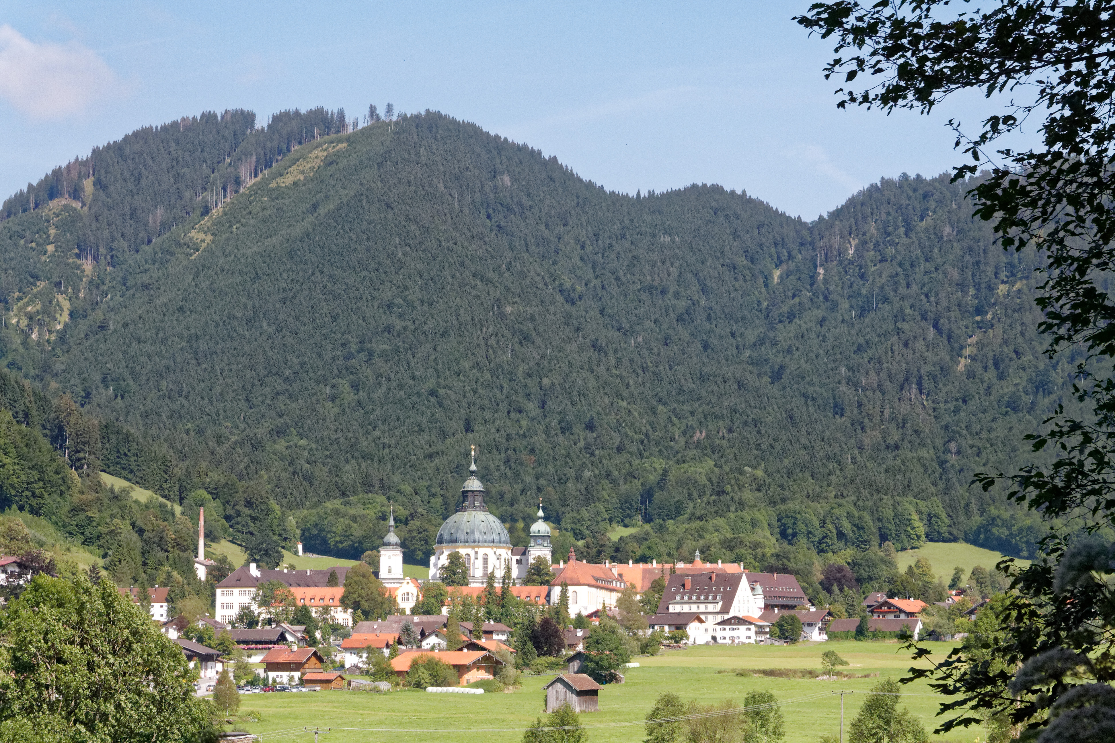 Ettal